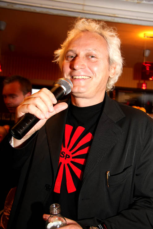 Sławek Pietrzak w czasie premiery płyty Kultu Hurra